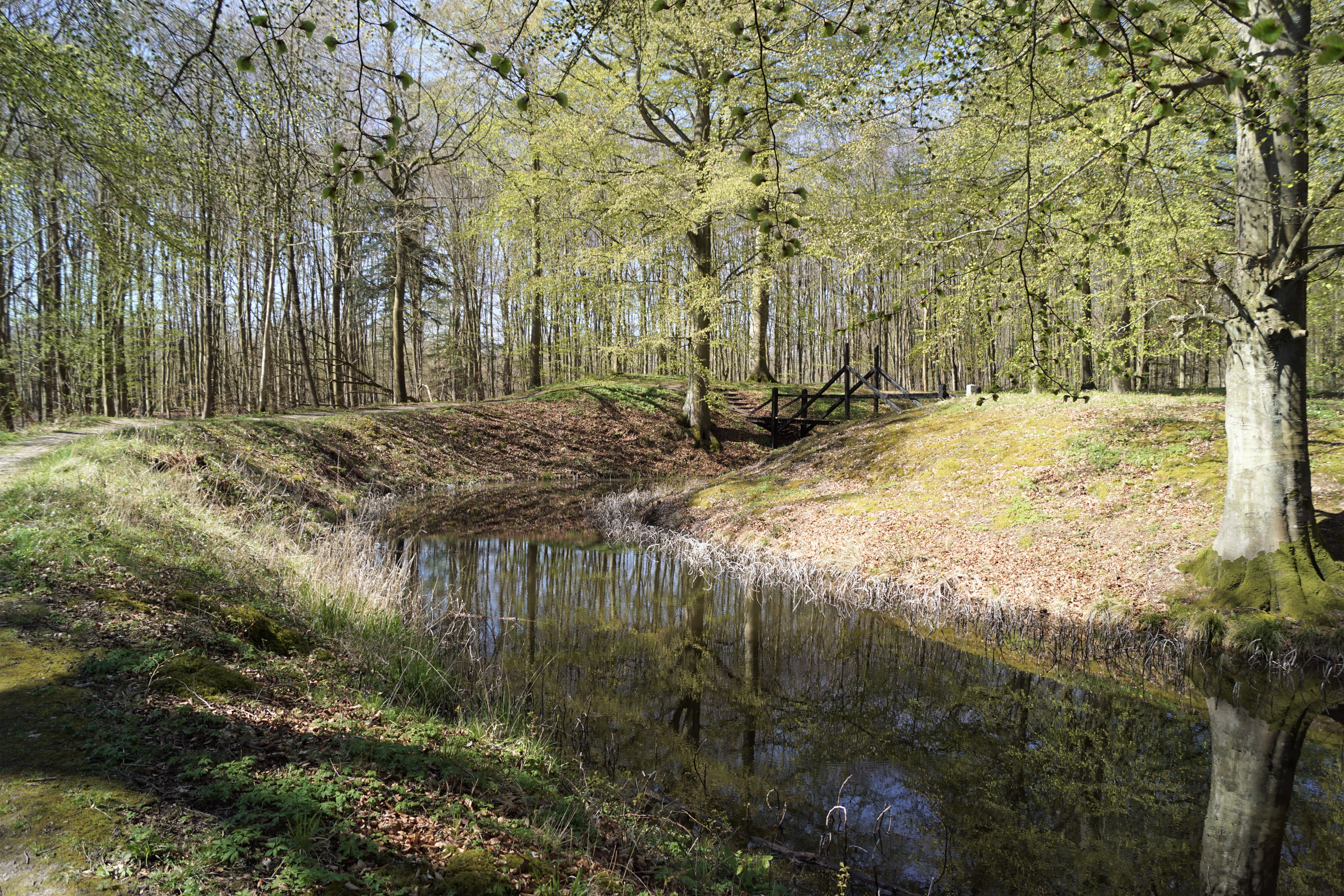 Voldgraven